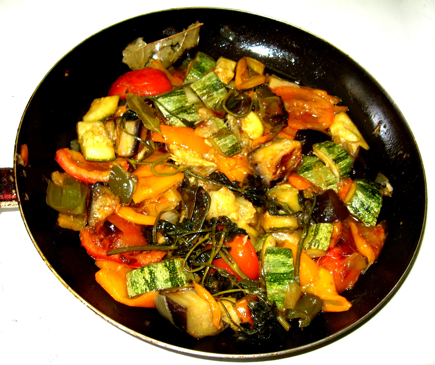 plat de ratatouille